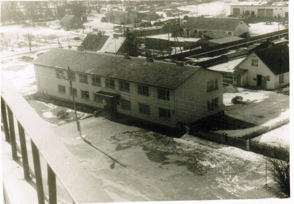 Harju KEKi vana peahoone. Pilt perekond Arula erakogust.